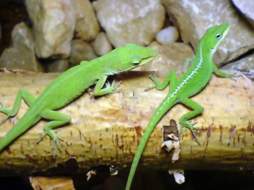 Anolis carolinensis